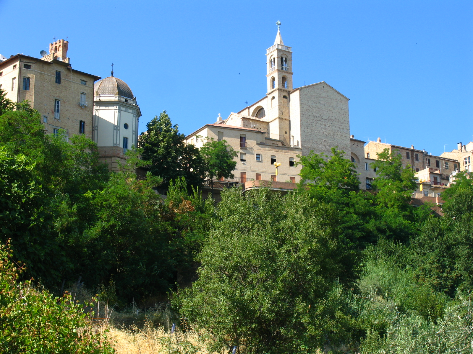 Acquaviva Picena, Marche, Italia